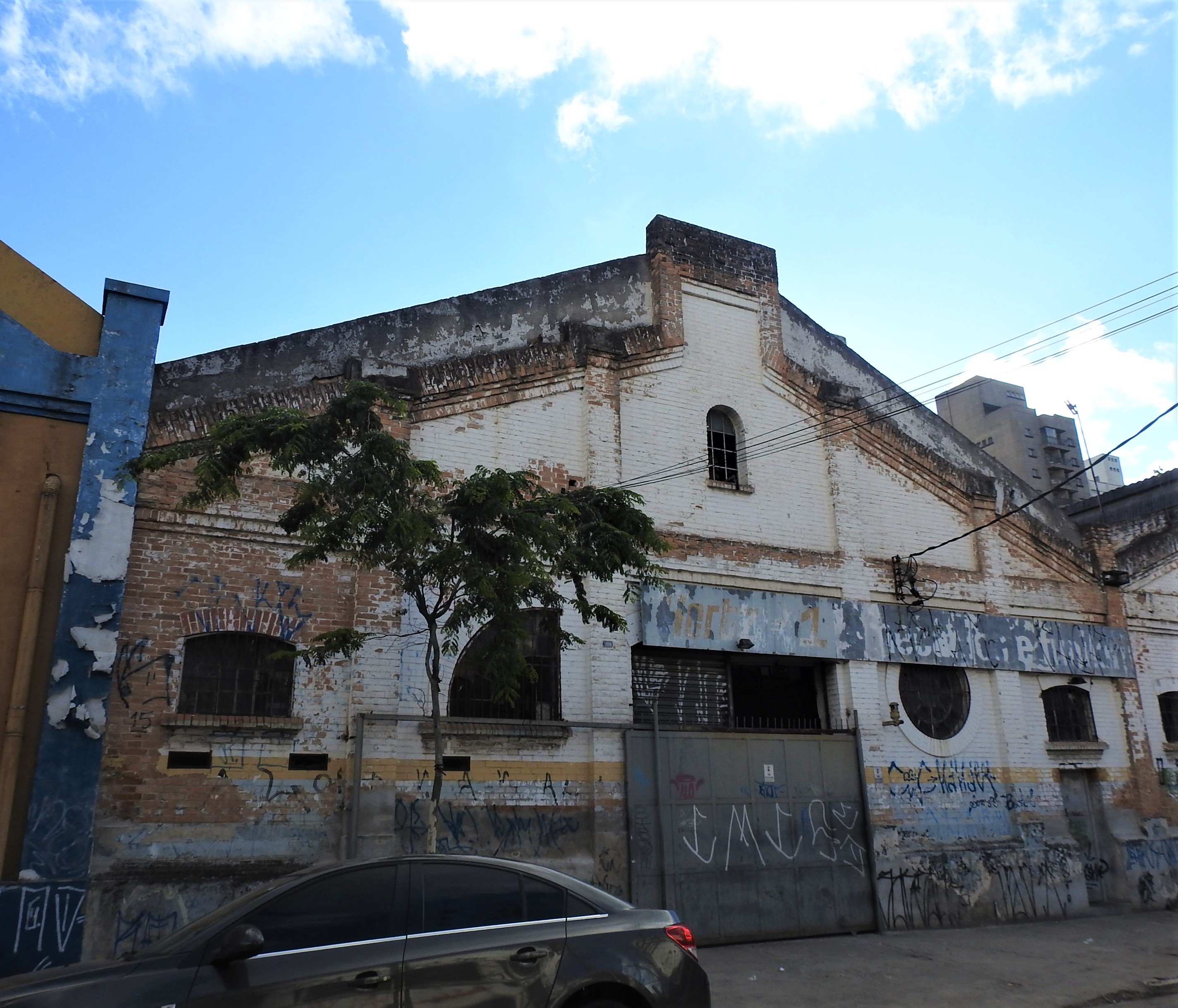 Galpão, bem tombado pelo CONDEPHAAT na cidade de São Paulo. Cultural propertyBuilding at Rua Conselheiro Nébias 1699, São Paulo, Brazil Q67936989, CONDEPHAAT ID: conjunto-de-imoveis-do-bairro-campos-eliseos